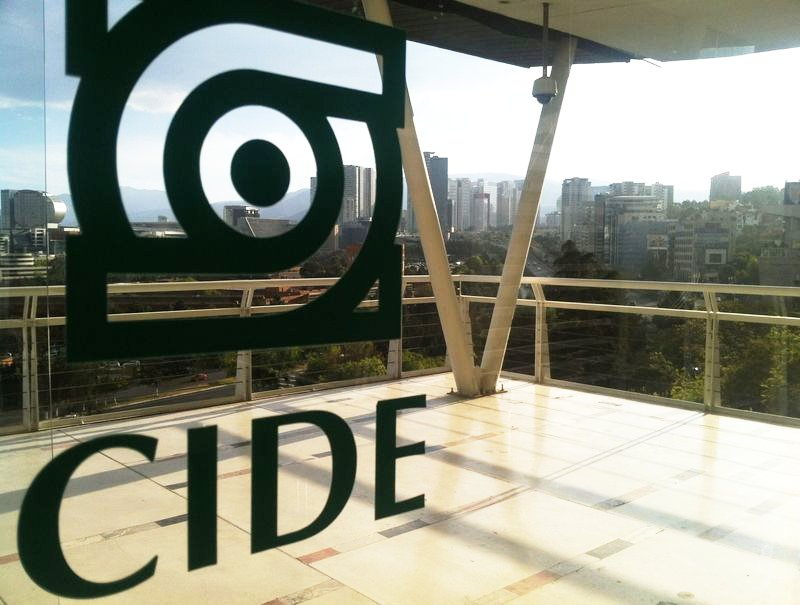 Paisaje desde la azotea del edificio Santa Fe del Centro de Investigación y Docencia Económicas (CIDE)